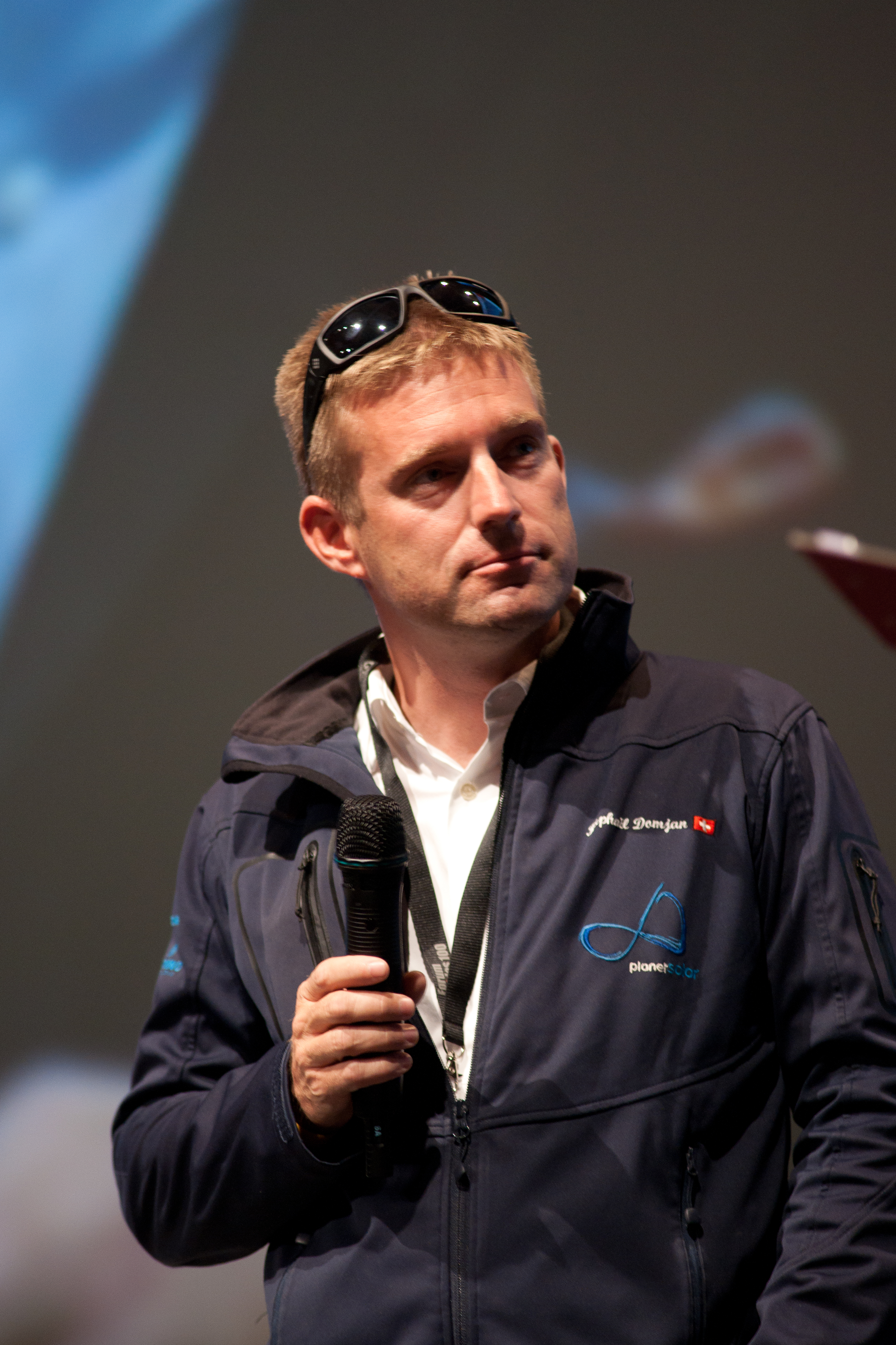 Raphaël Domjan, au Forum des 100, en 2012.